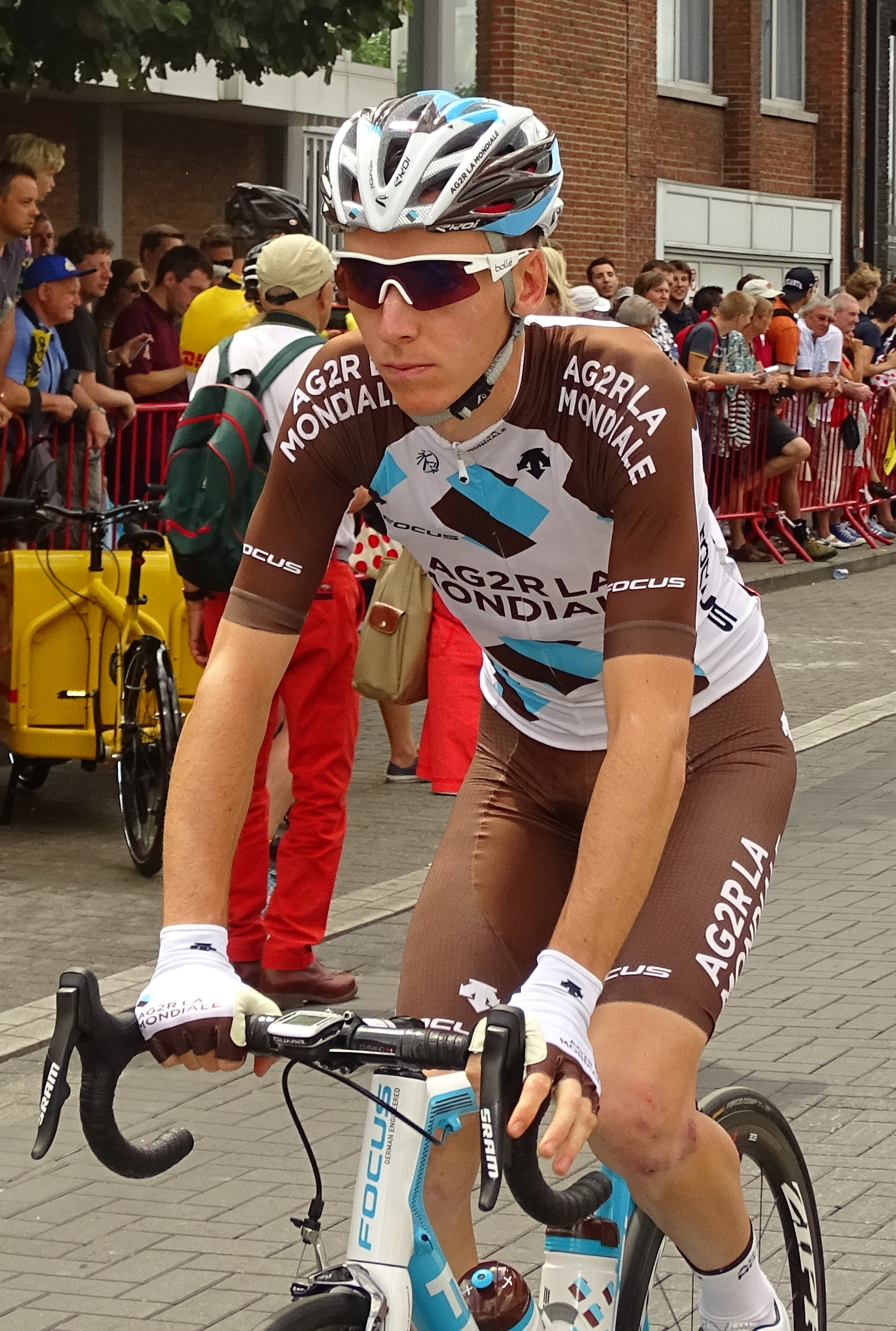 Reportage réalisé le lundi 6 juillet à l'occasion du départ de la troisième étape du Tour de France 2015 à Anvers, Belgique.